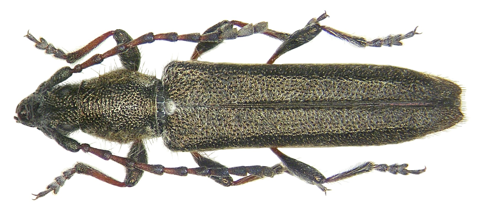 Familie: Cerambycidae Grösse: 6-11 mm Verbreitung: Europa Ökologie: Entwicklung in verholzten Papilionaceae Fundort: Italien, Prov. Siena, C. San Gimignano leg. det. G.Rößler, 1987 Foto: U.Schmidt, 2006